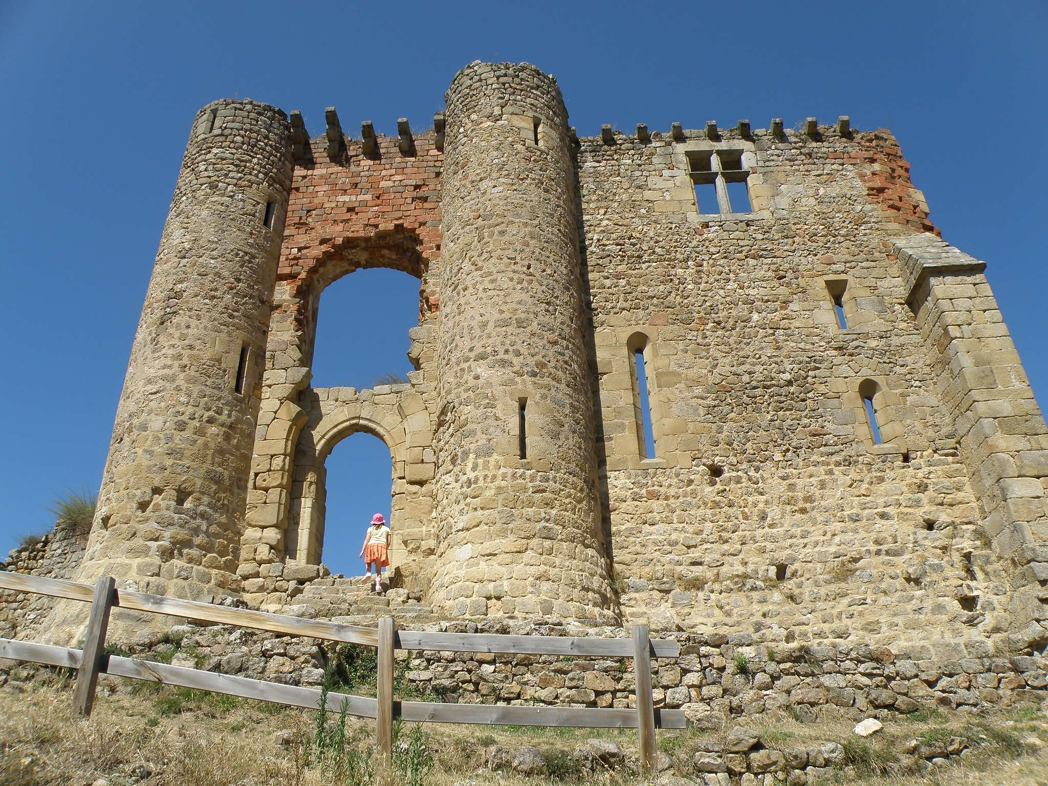 Château de Rochebaron, sis dans la commune de Bas-en-Basset, dép. de la Haute-Loire, France (région Auvergne). Porterie (à gauche), et mur méridional de la chapelle (à droite). La porterie comporte un portail d'entrée à arc légèrement brisé, encadré de deux tourelles. Une glissière est présente pour faire coulisser une herse. Remarquer l'usage (rarissime) qui a été fait de briques de gros calibre.